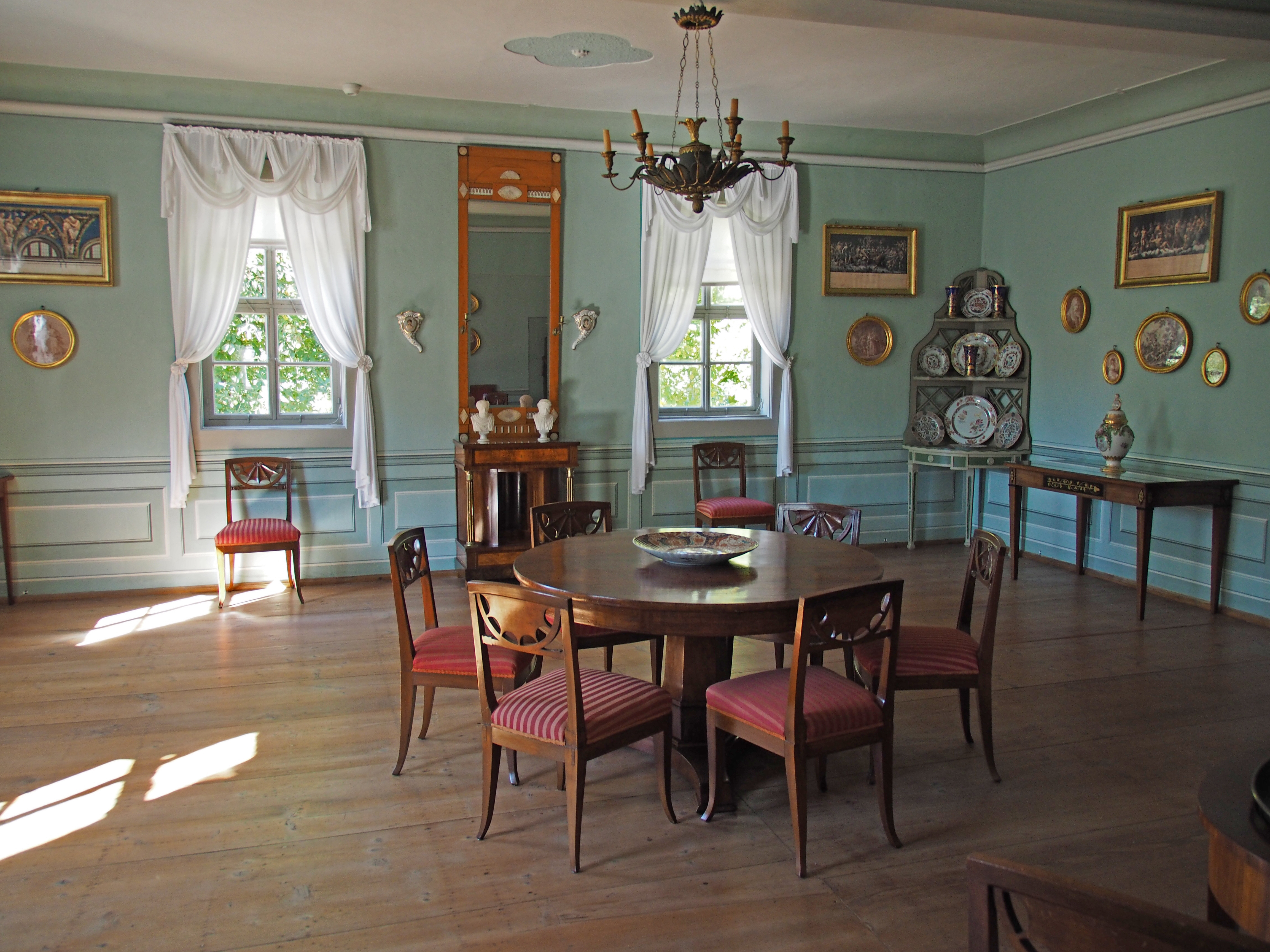 Raum im Schloss Tiefurt